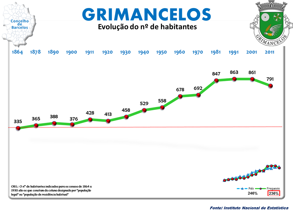 Censos 1964/2011